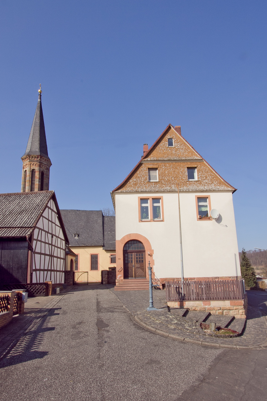 Alte Schule in Effolderbach (Ortenberg) im Wetteraukreis in Deutschland